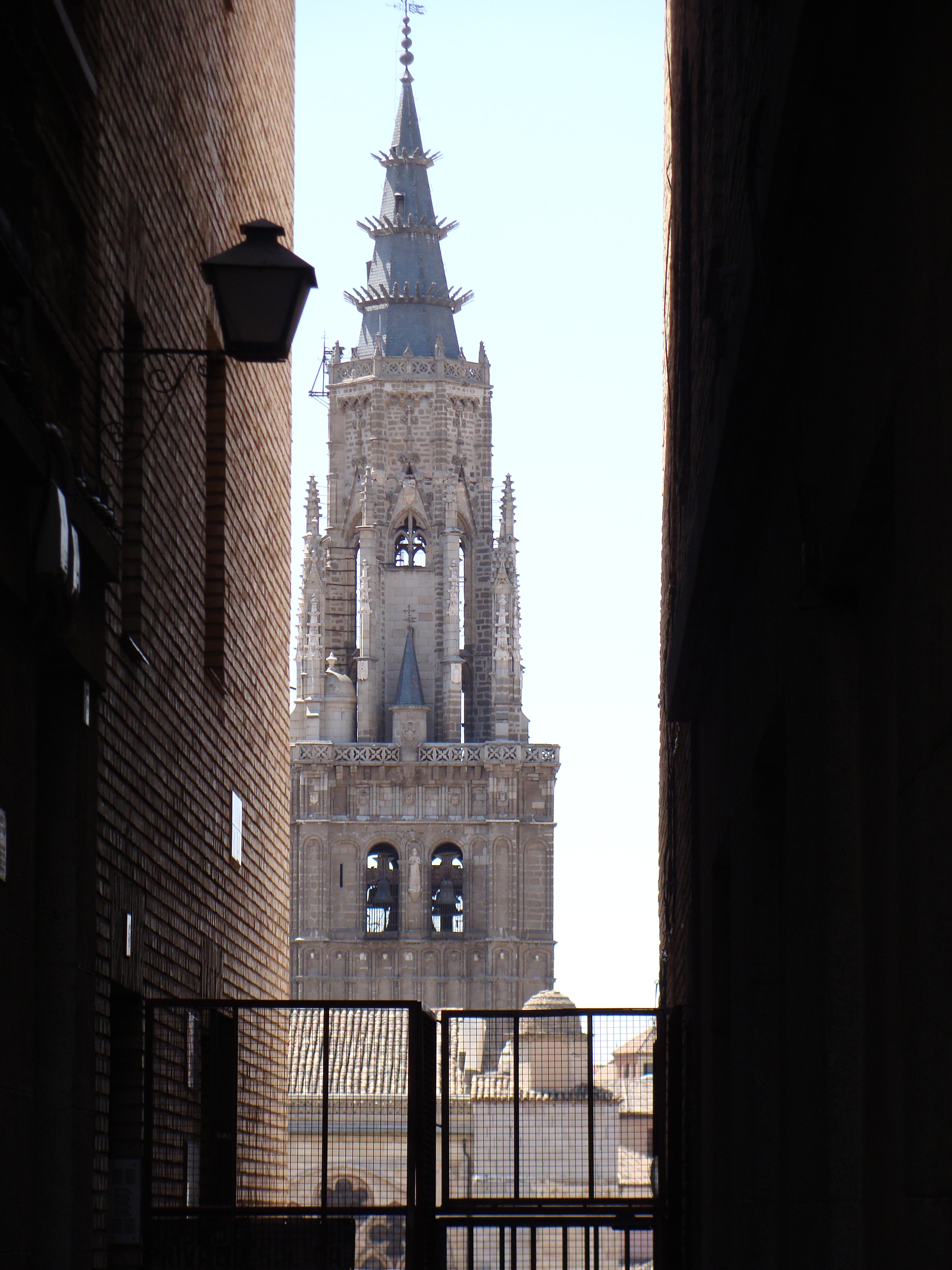 clocher de la Cathédrale de Tolède